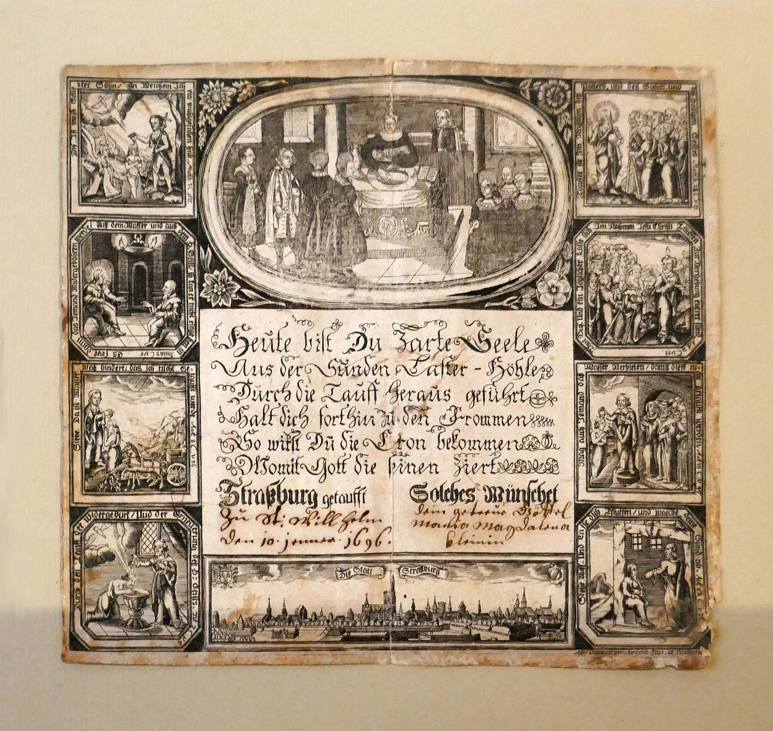 La plus ancienne lettre de baptême (Goettelbrief) imprimée d'Alsace : 1696, Strasbourg. Gravure sur bois d'A. Dannecker. Voeux pour un enfant baptisé à l'église Saint-Guillaume. Remarquer le pasteur officiant au centre et la sage-femme à gauche. Exposition Vies protestantes : le mot et l'image au Musée alsacien de Strasbourg (2017).